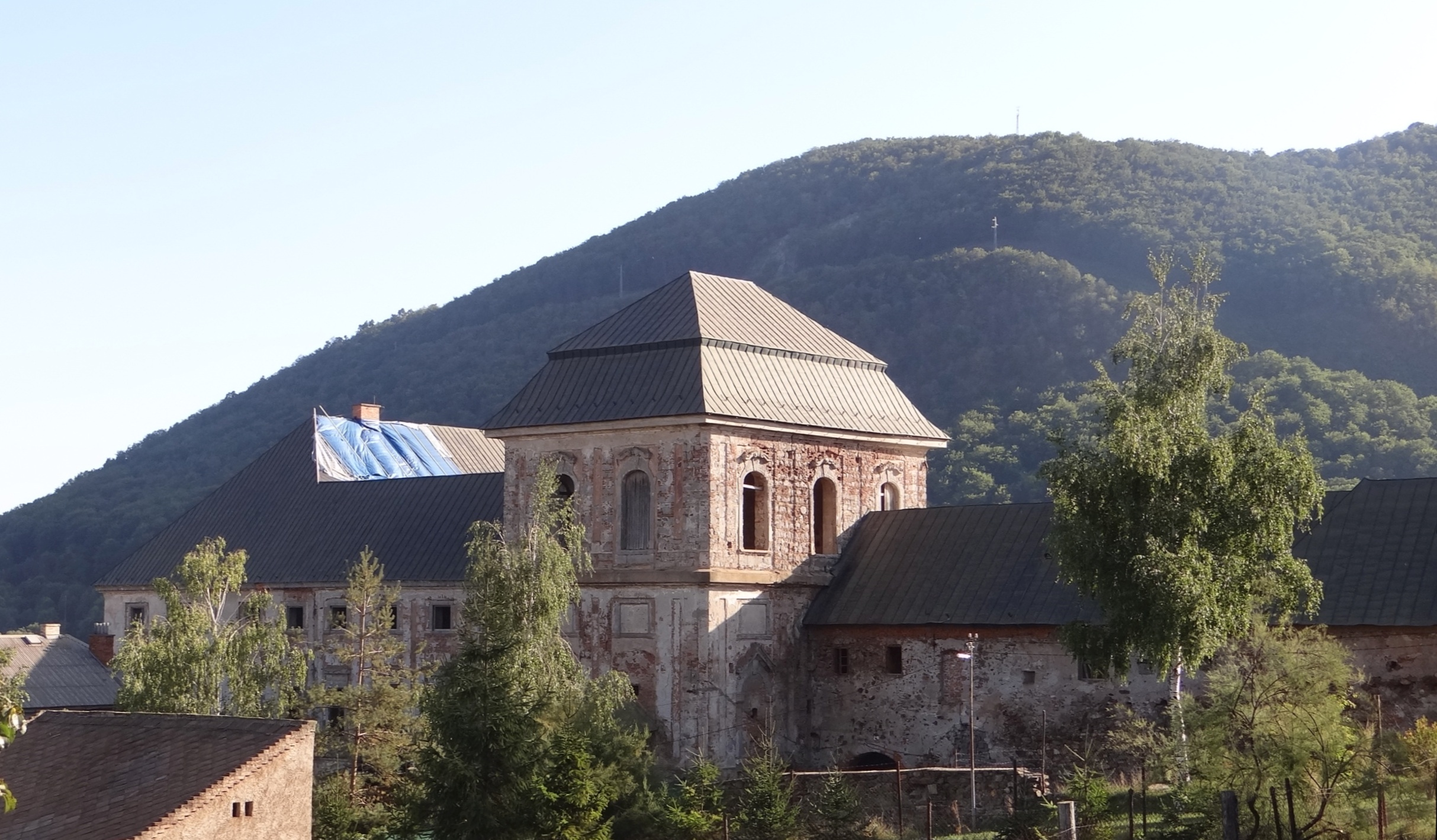 Jelšava